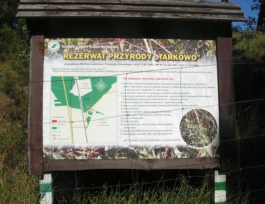 Rezerwat przyrody Tarkowo w Puszczy Bydgoskiej